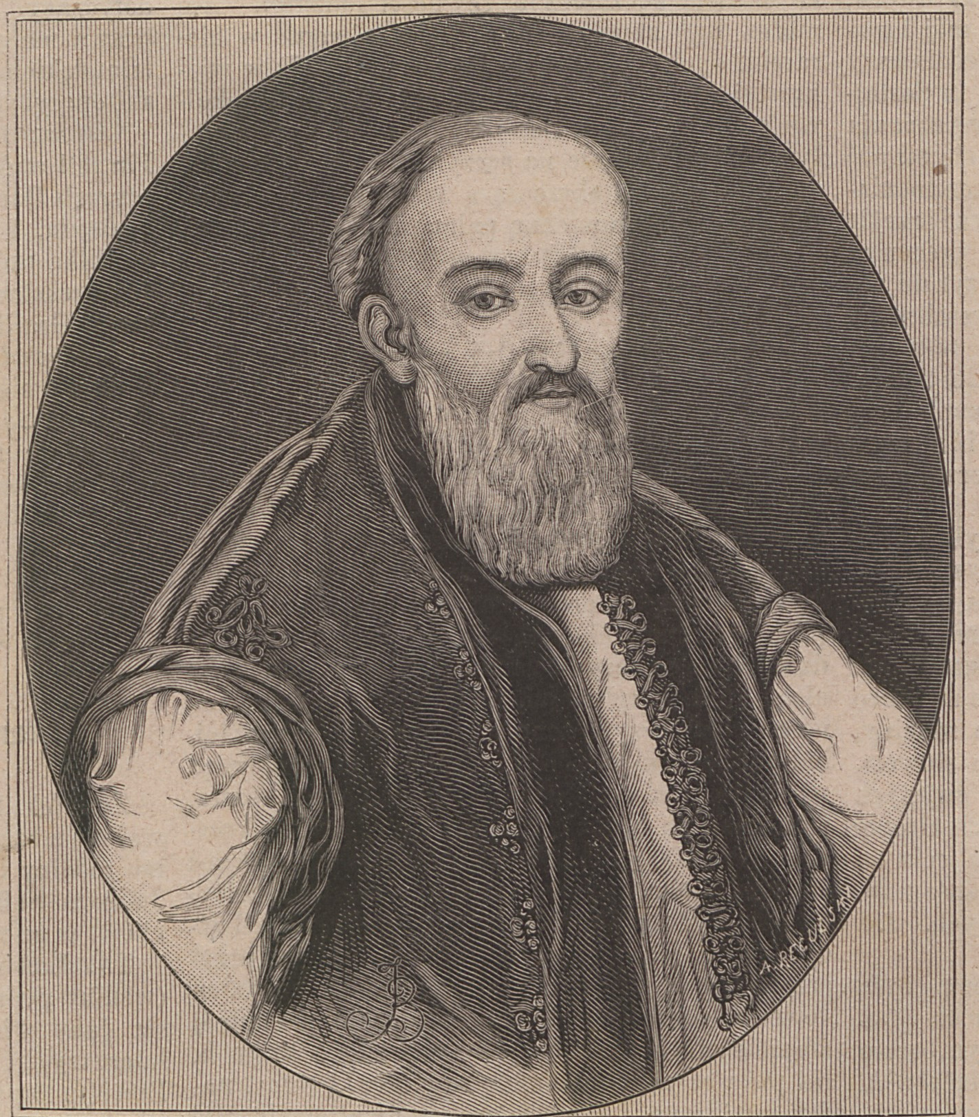 Stanisław Zygmunt Druszkiewicz